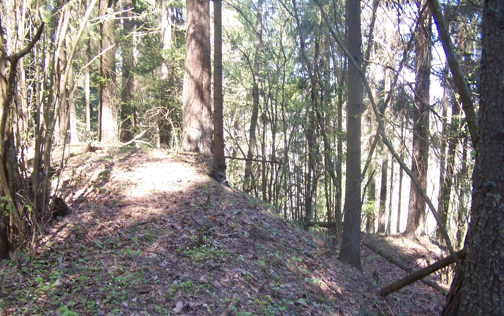 Aluotų piliakalnio fragmentas